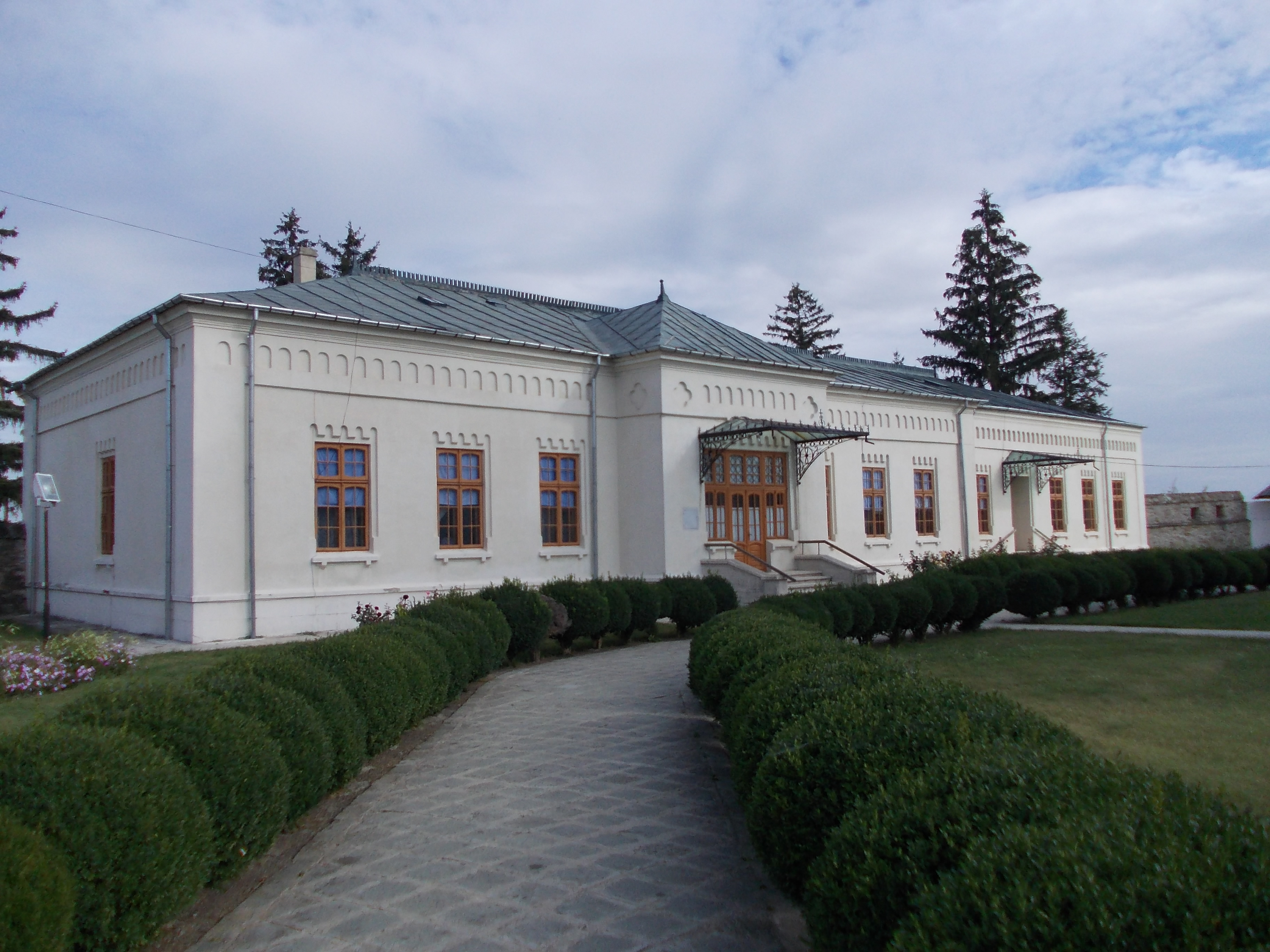 Palat episcopal 03